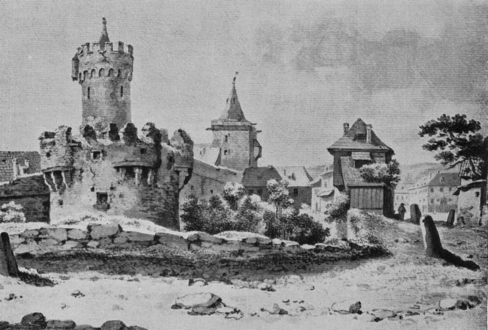 Pulverturm und das Johannistorin Jena Aquarell von Georg Melchior Kraus im Goethe-Nationalmuseum in Weimar (1932)